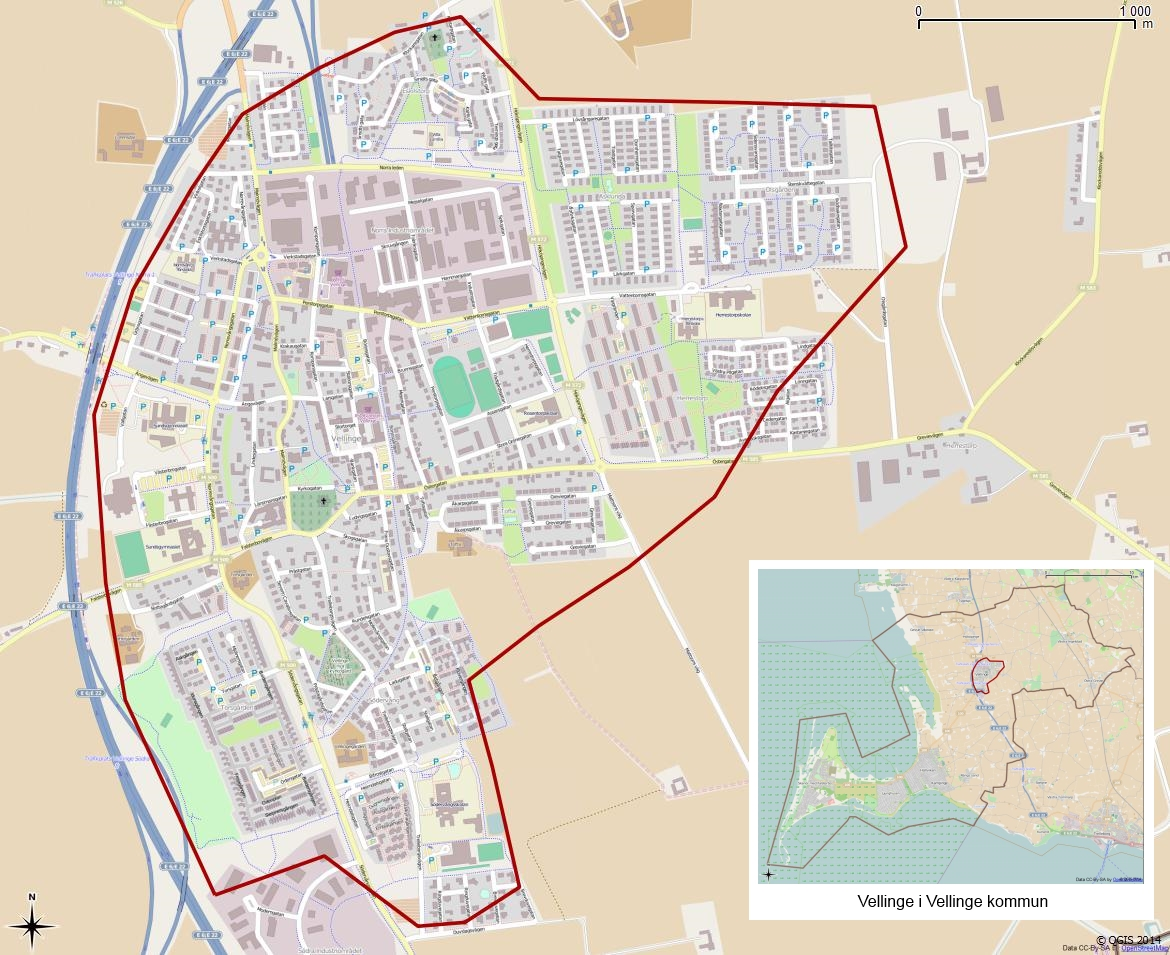 Tätorten Vellinges gränser 1990 enligt Atlas över rikets indelningar 1992.